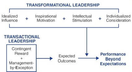 흐름도 작성